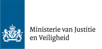 Het officiële logo van het Ministerie van Justitie en Veiligheid